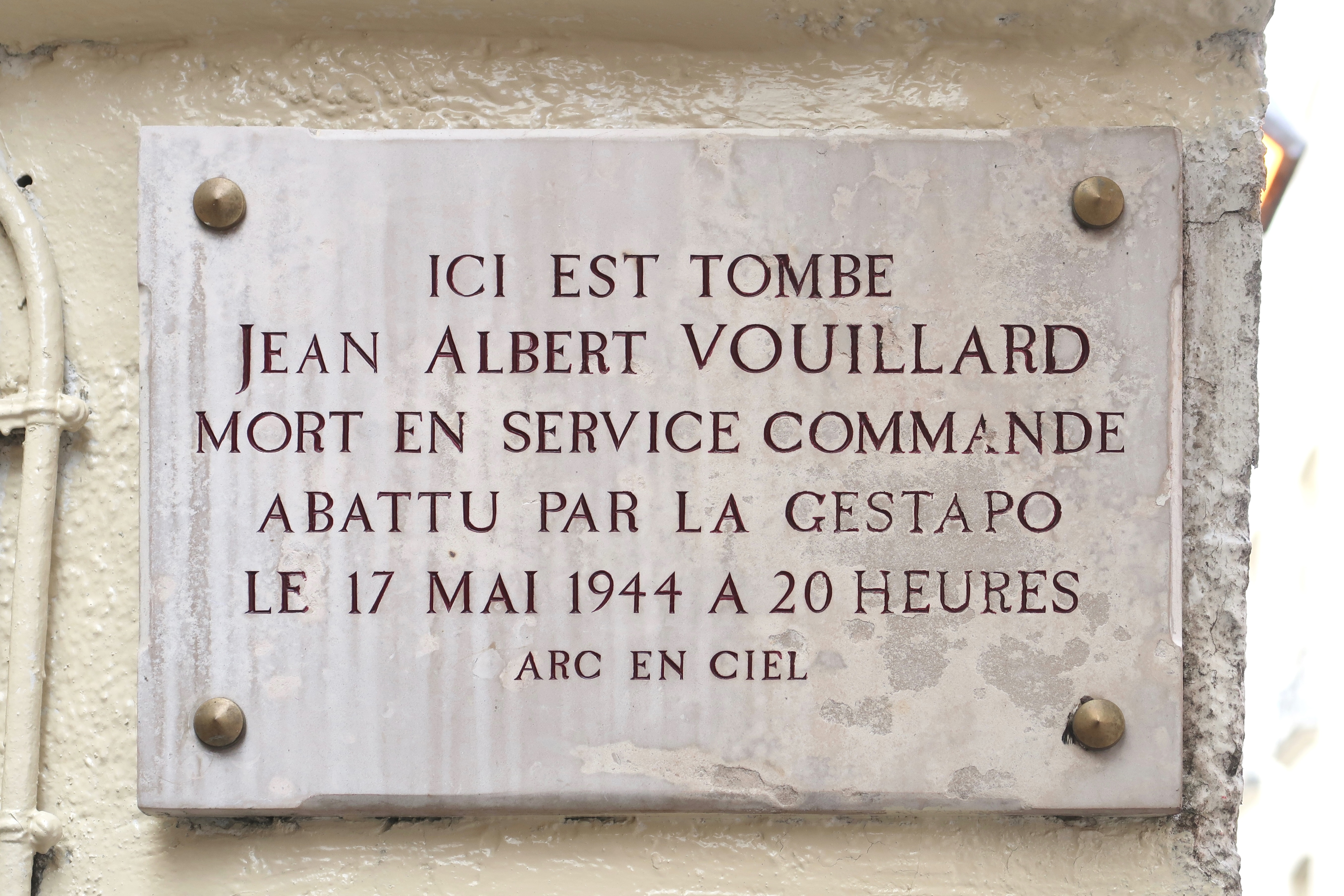 Plaque en hommage à Jean Albert Vouillard, 28 rue de la Huchette (Paris, 5e).